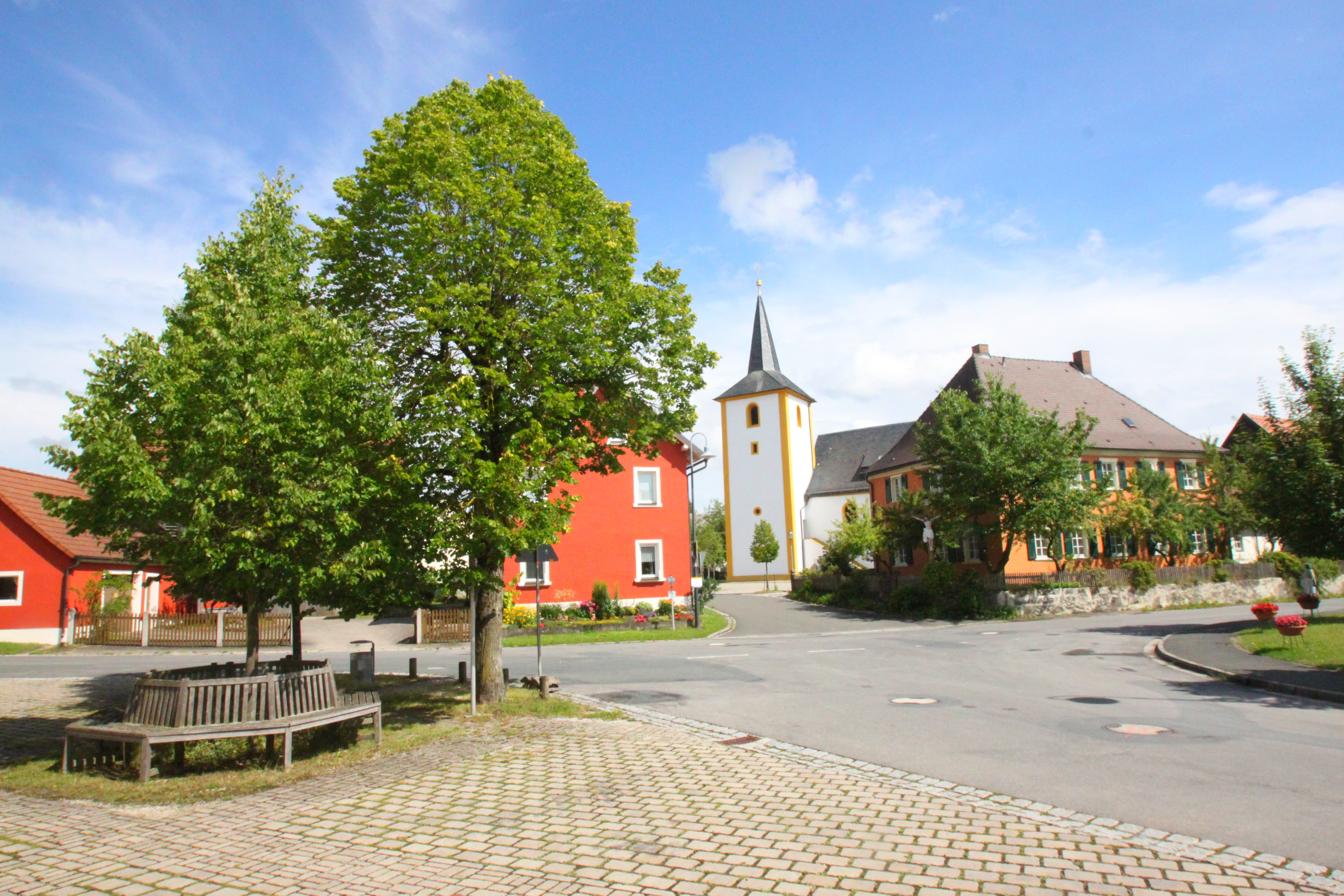 Die Ortsmitte in Stadelhofen mit Pfarrkirche St. Peter und Paul im Hindergrund